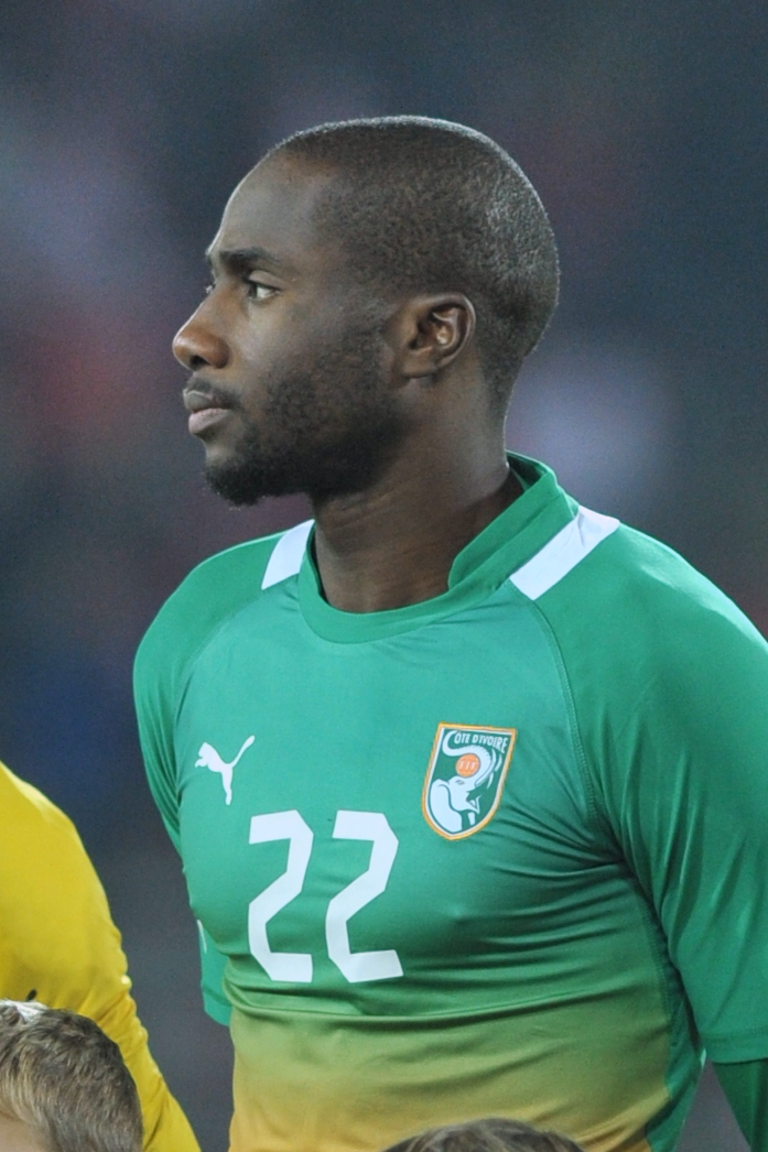 ÖFB freundschaftliches Länderspiel - Österreich vs Elfenbeinküste am 14. November 2012 The making of this work was supported by Wikimedia Austria. For other files made with the support of Wikimedia Austria, please see the category Supported by Wikimedia Österreich. Elfenbeinküste Nr. 22: Sol Bamba